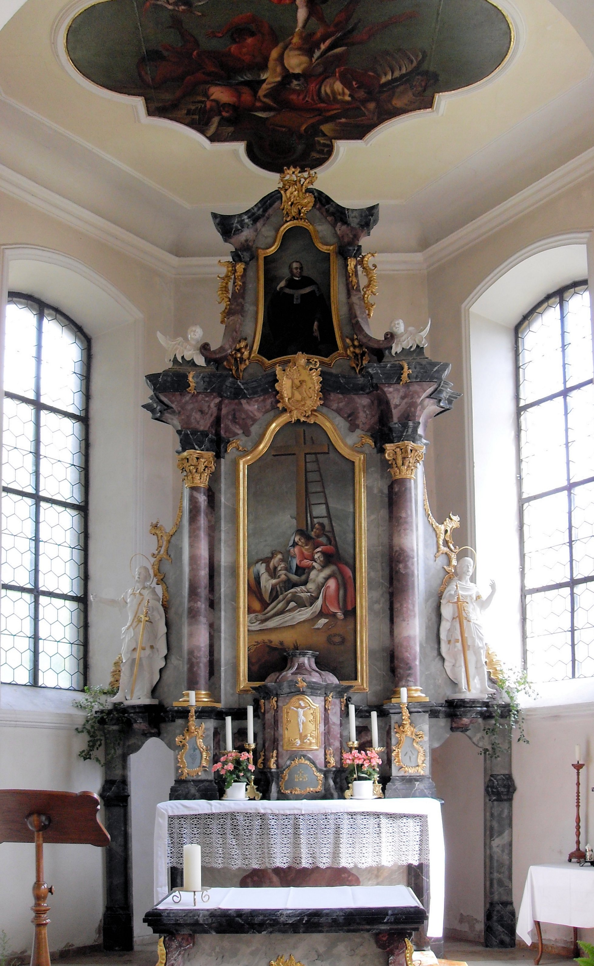 Innenansicht der St.-Felix- und Nabor-Kapelle in Schmidhofen, Stadt Bad Krozingen, Baden-Württemberg